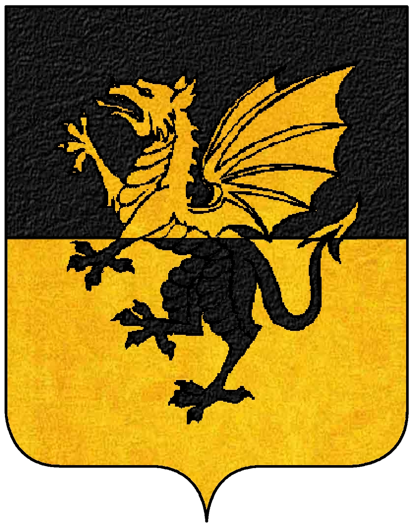 Stemma della famiglia Arnaldi